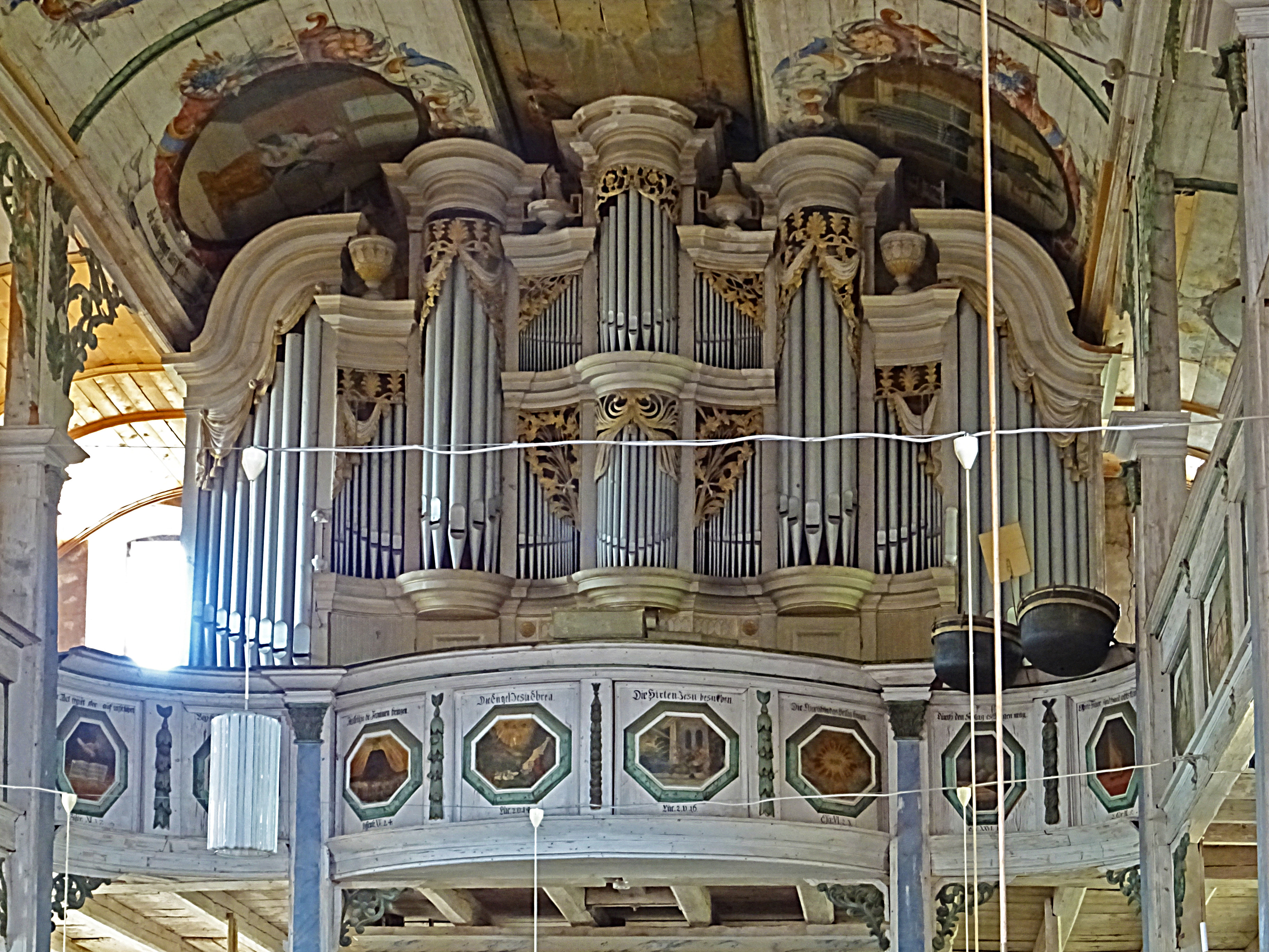 Orgel von Johann Heinrich Hartung (Kölleda, 1806–13, II/P23) in der St. Petri-Pauli-Kirche (Günstedt)[1]